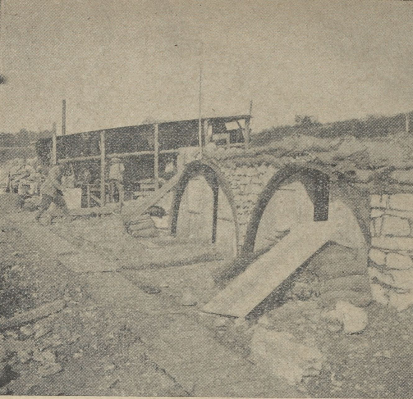 Le. P. C. du 53e R. A. C. à la cote 309 (30 juillet-15 septembre 1917). La côte 309 est au-dessus de Montzéville.